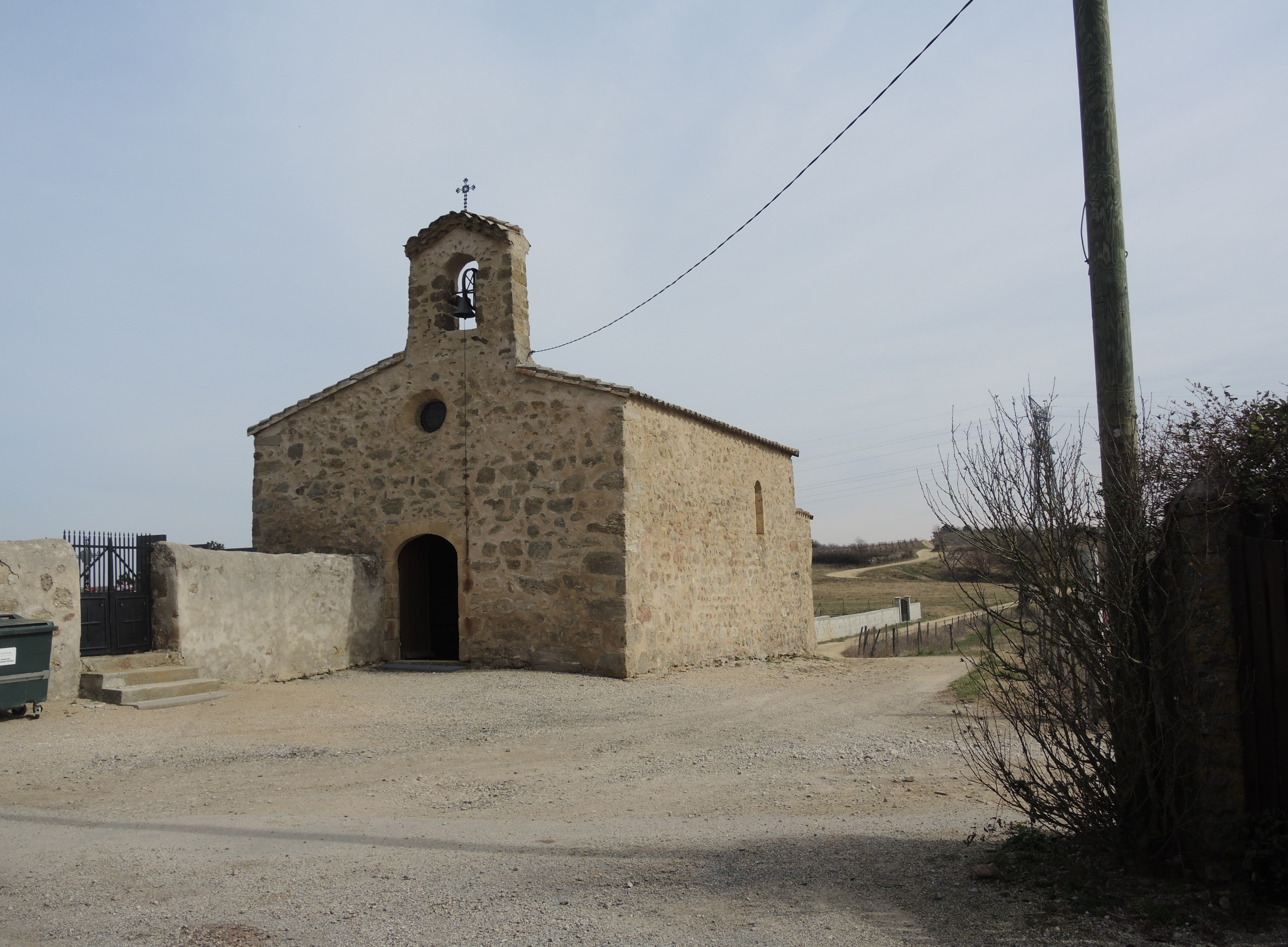 Peyraud détail